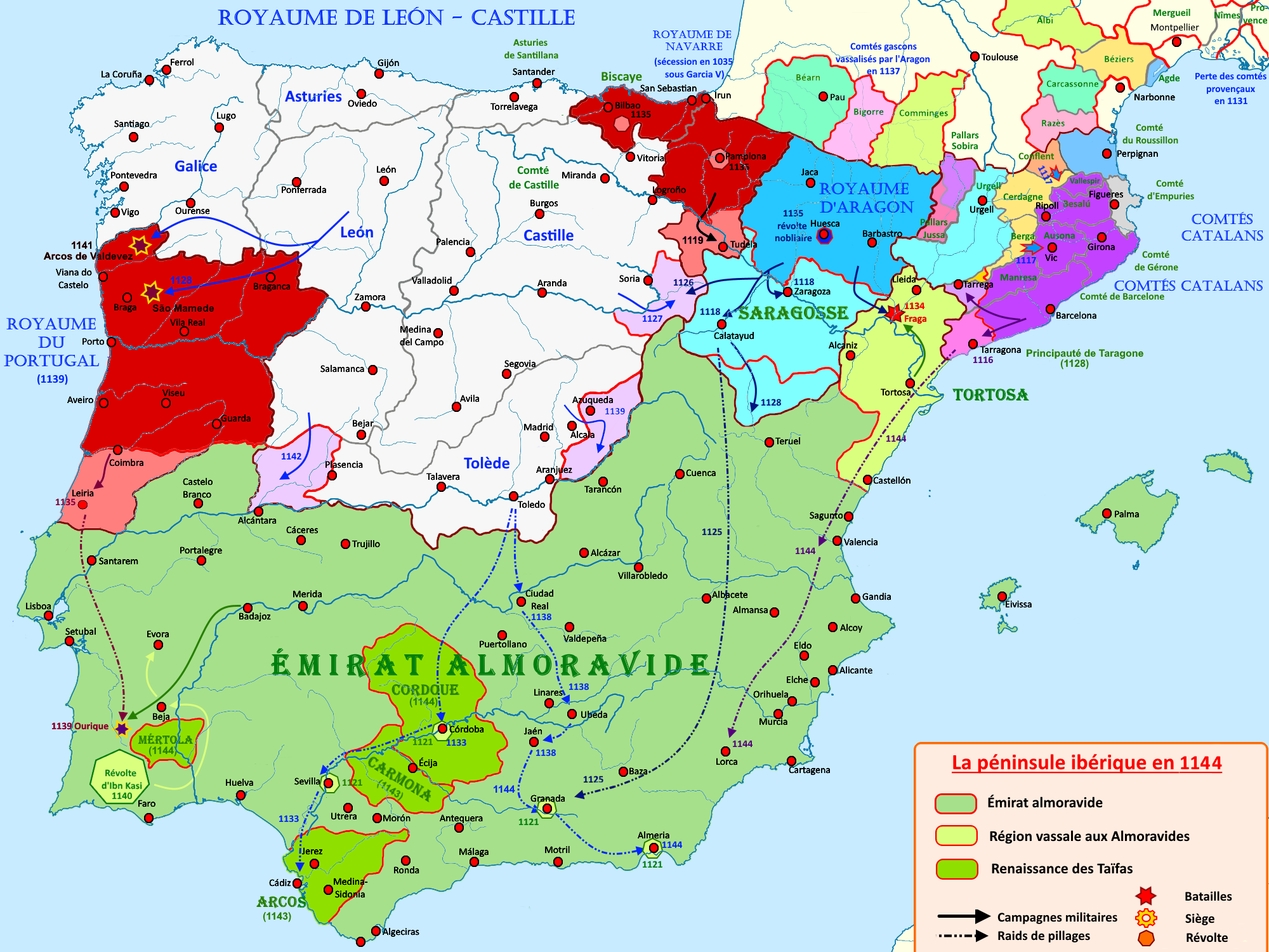 Carte de la péninsule ibérique en 1144 avec ses principaux évènements